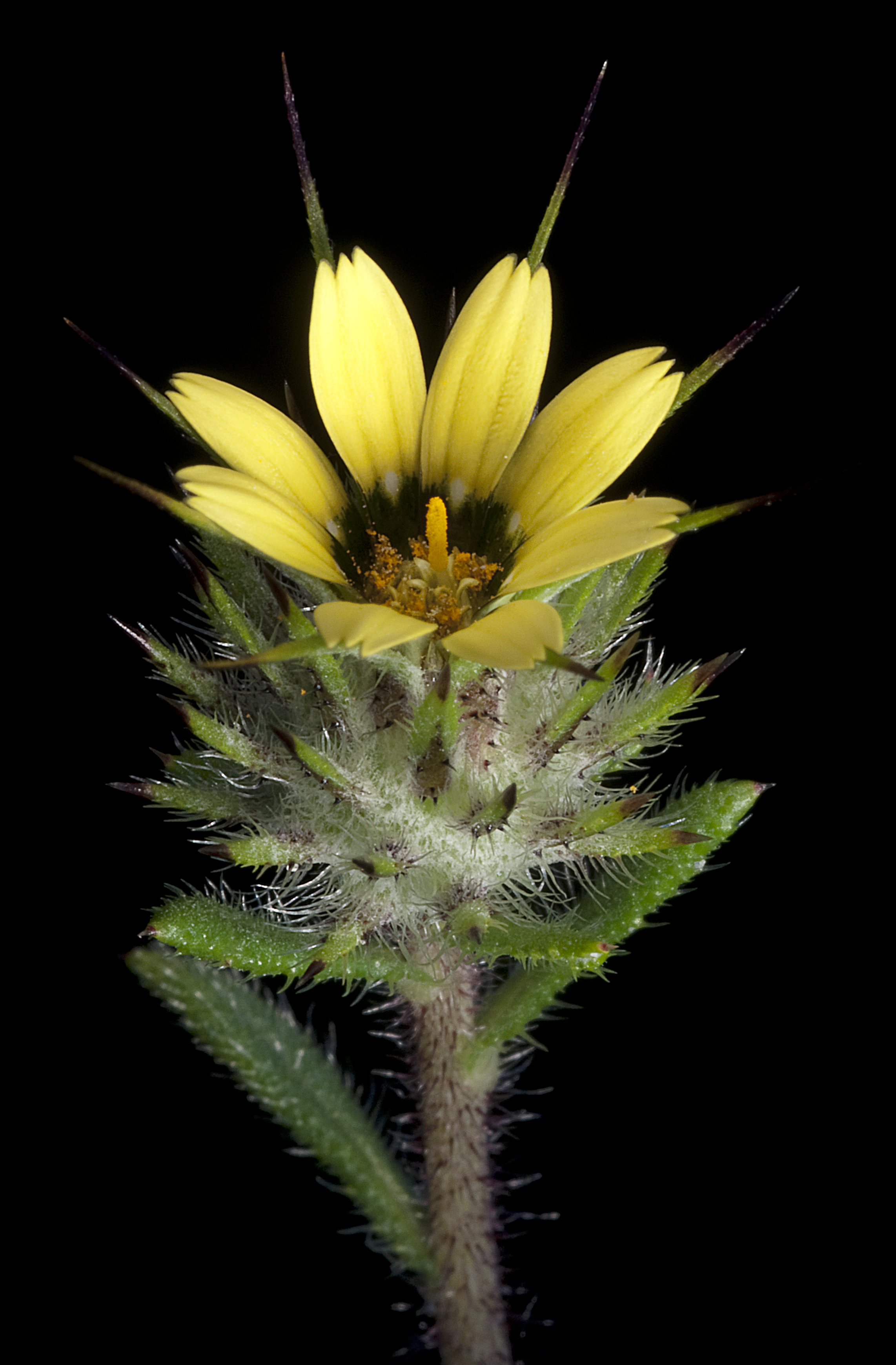 KRT4008